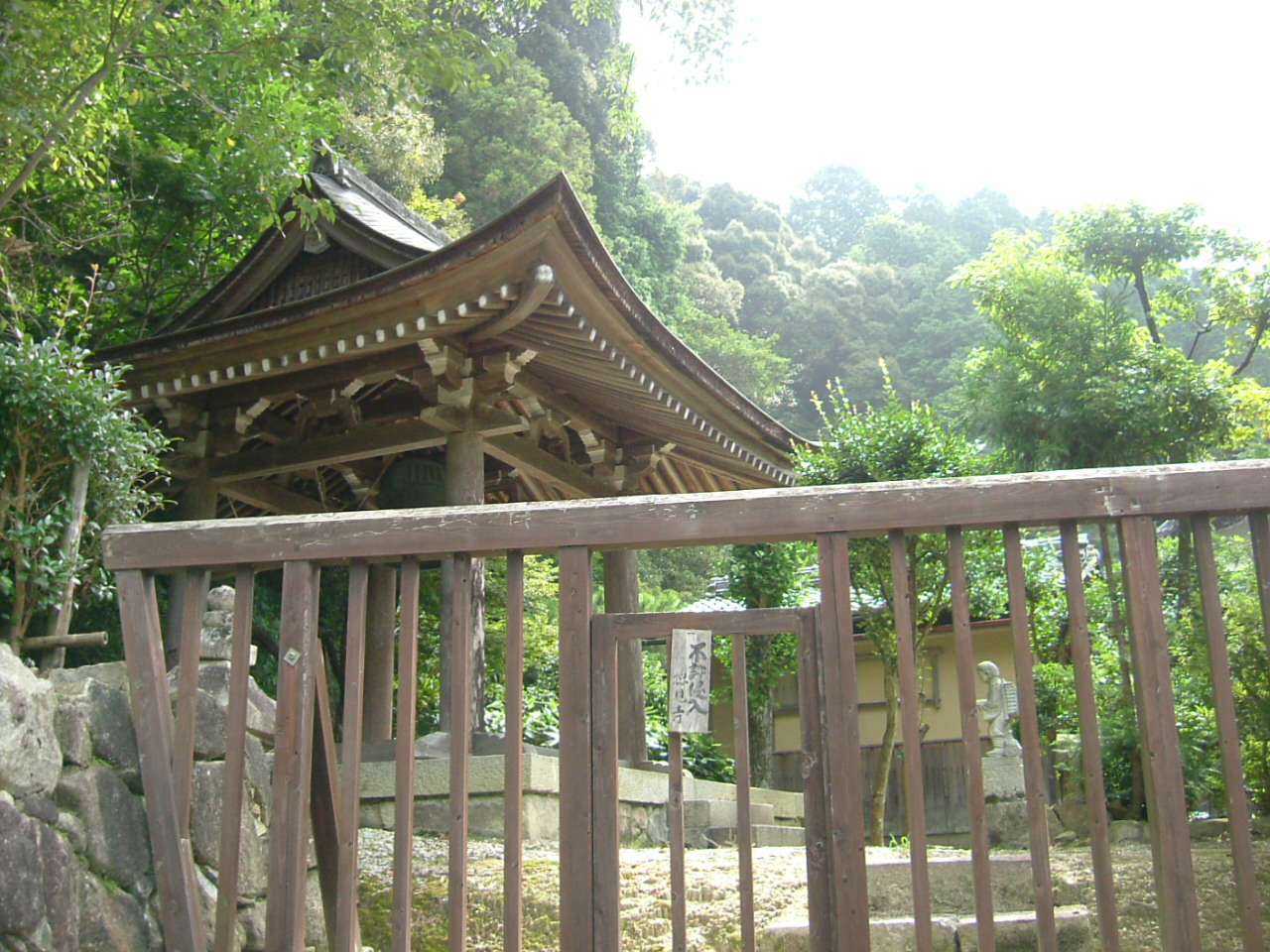 摠見寺仮本堂。（安土城徳川家康邸跡）滋賀県蒲生郡安土町